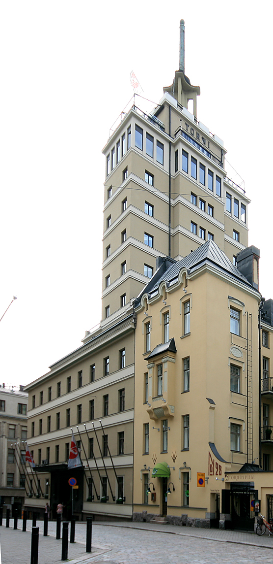 Hotelli Torni, Kalevankatu 5 / Yrjönkatu 26, Helsinki. Arkkitehti: Jung & Jung. Rakennusvuosi: 1930.